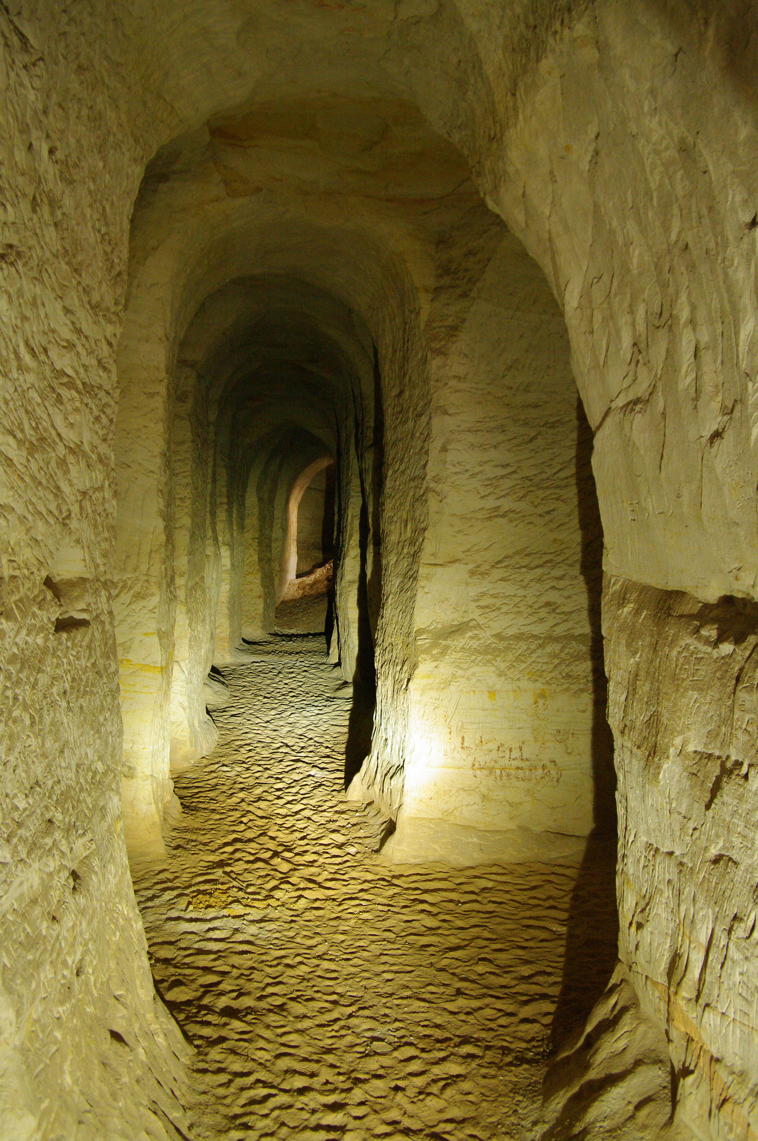 Piusa koopad/kaevandus, külastuskeskus